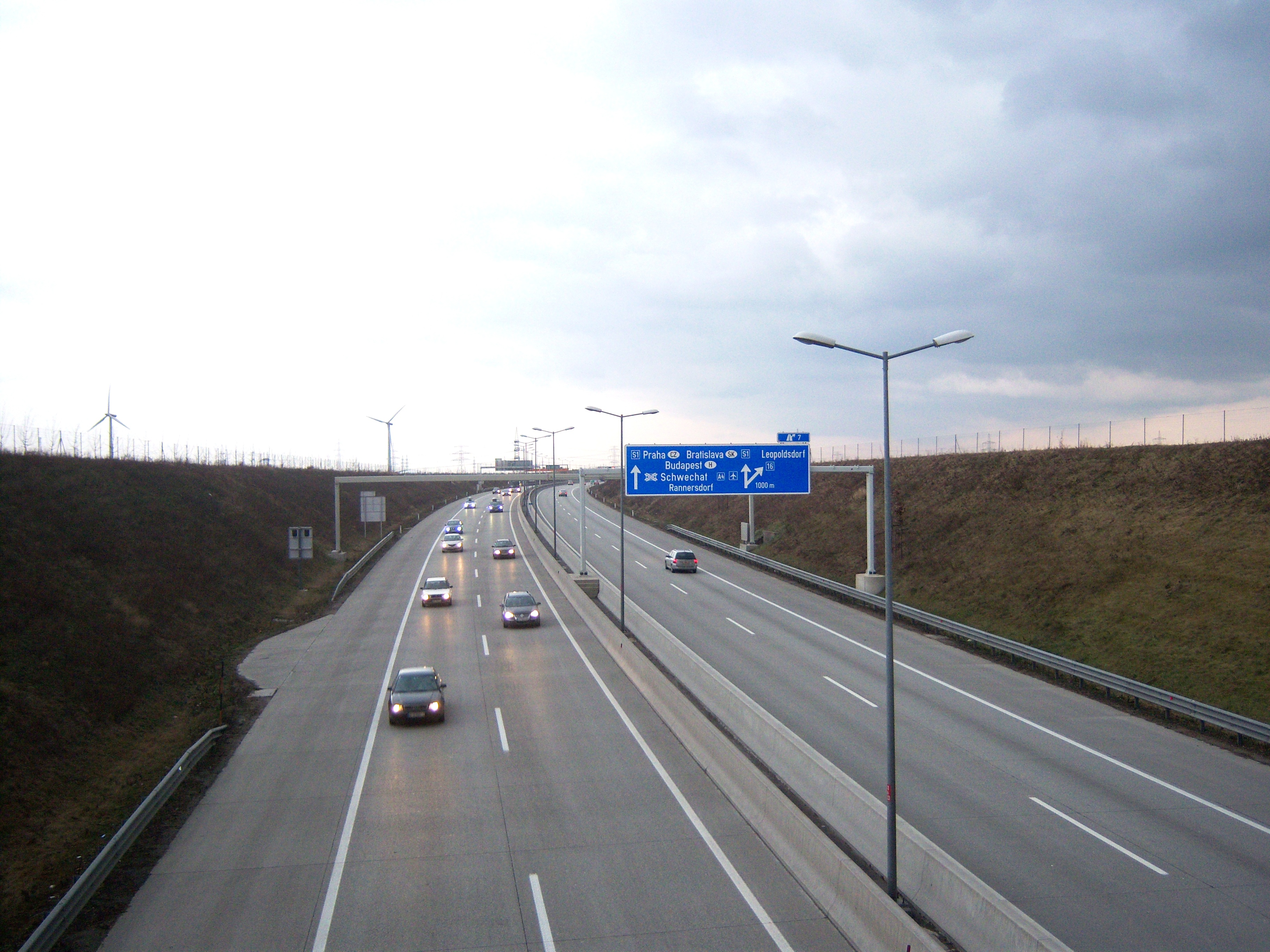 Wiener Außenring Schnellstraße S1 Richtung Schwechat vor der Anschlussstelle Leopoldsdorf